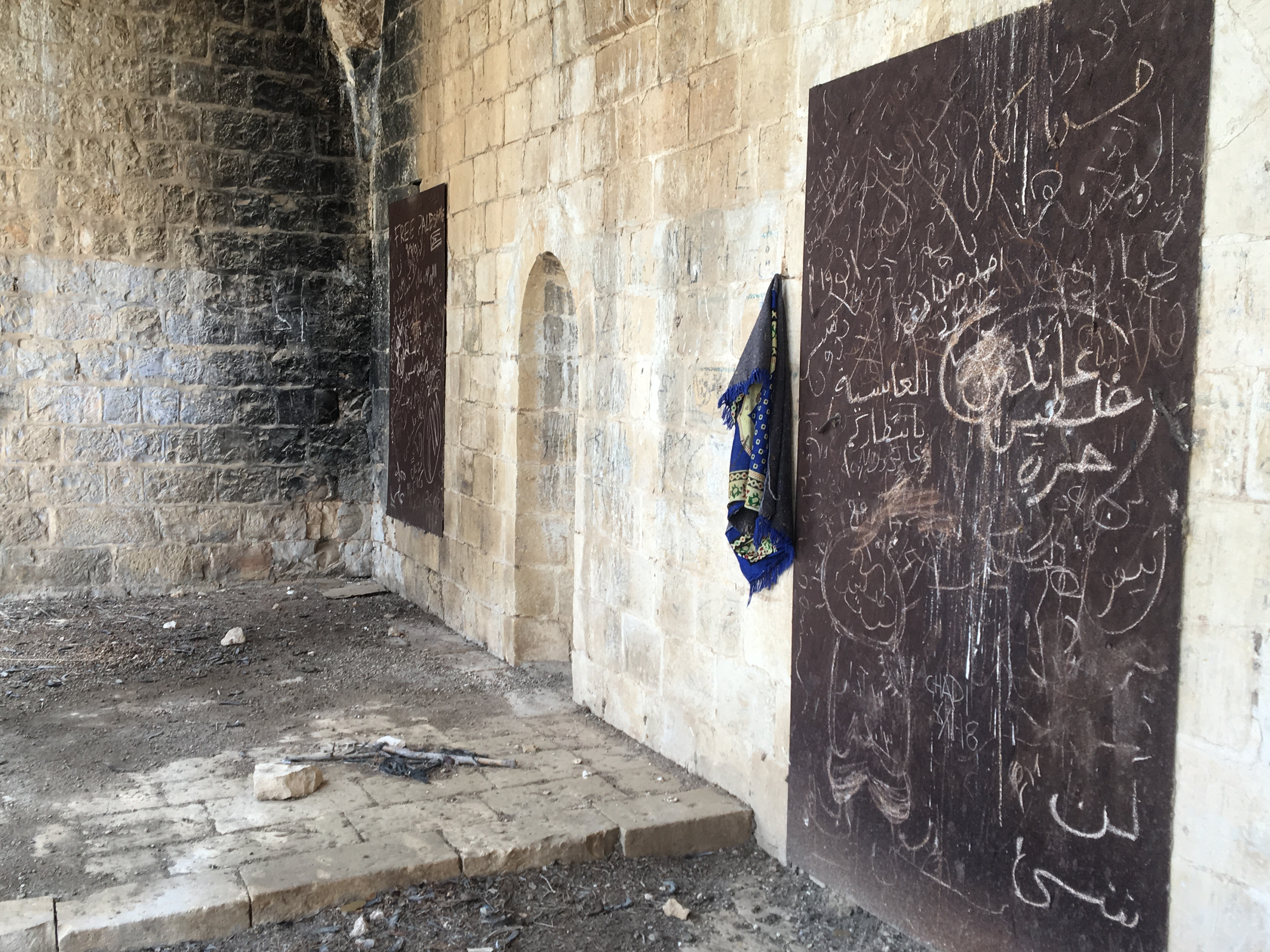 مسجد قرية الغابسيّة-فلسطين